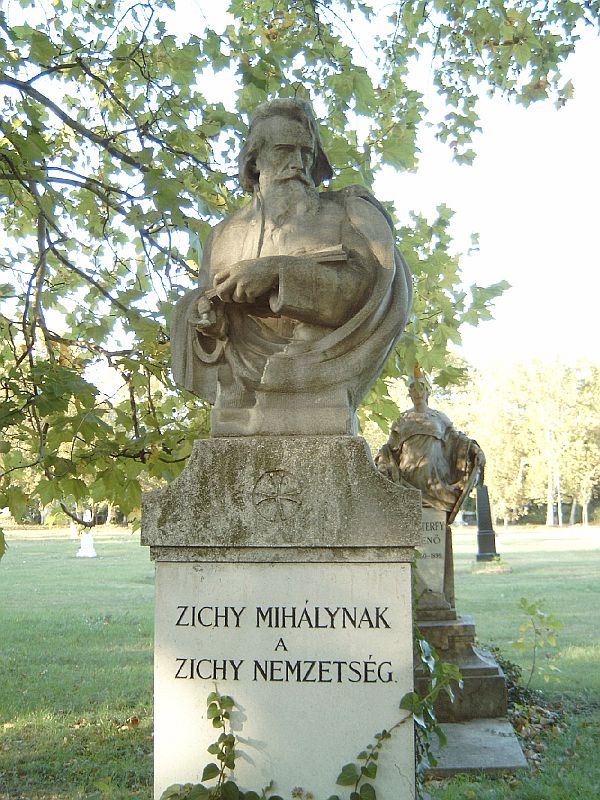 Zichy Mihály sírja Budapesten. Gerster Kálmán építész és Stóbl Alajos szobrászművész alkotása. Kerepesi temető: 28-díszsor-14.